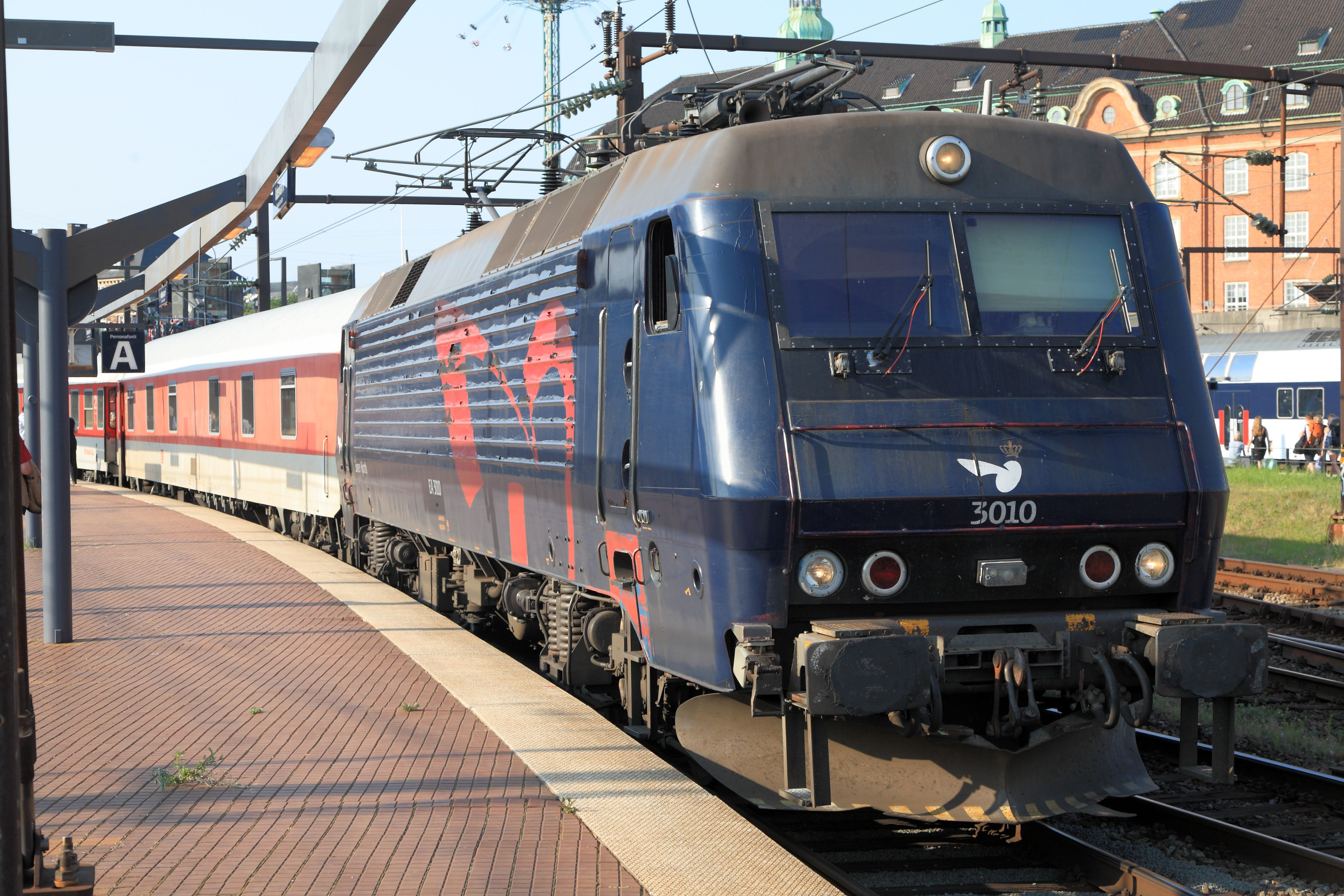 CNL nach Prag und Amsterdam nach Bereitstellung am Bahnsteig. Dass die gut genutzte Verbindung eineinhalb Jahre später ersatzlos eingestellt würde, ahnte zum Aufnahmezeitpunkt noch niemand.